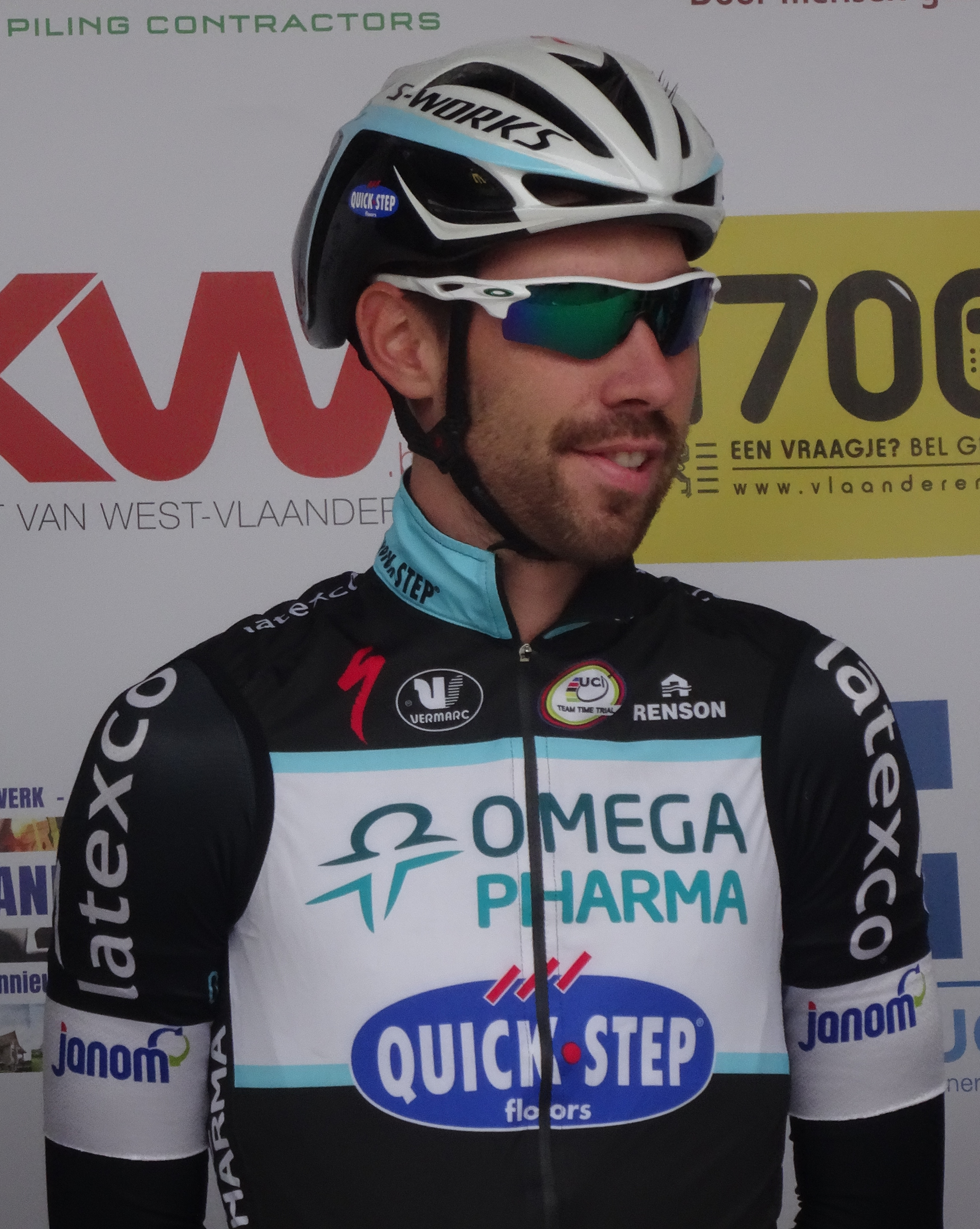 Reportage photographique réalisé le mercredi 24 septembre à l'occasion du départ et du début de la course du Circuit du Houtland 2014 à Lichtervelde, Belgique.